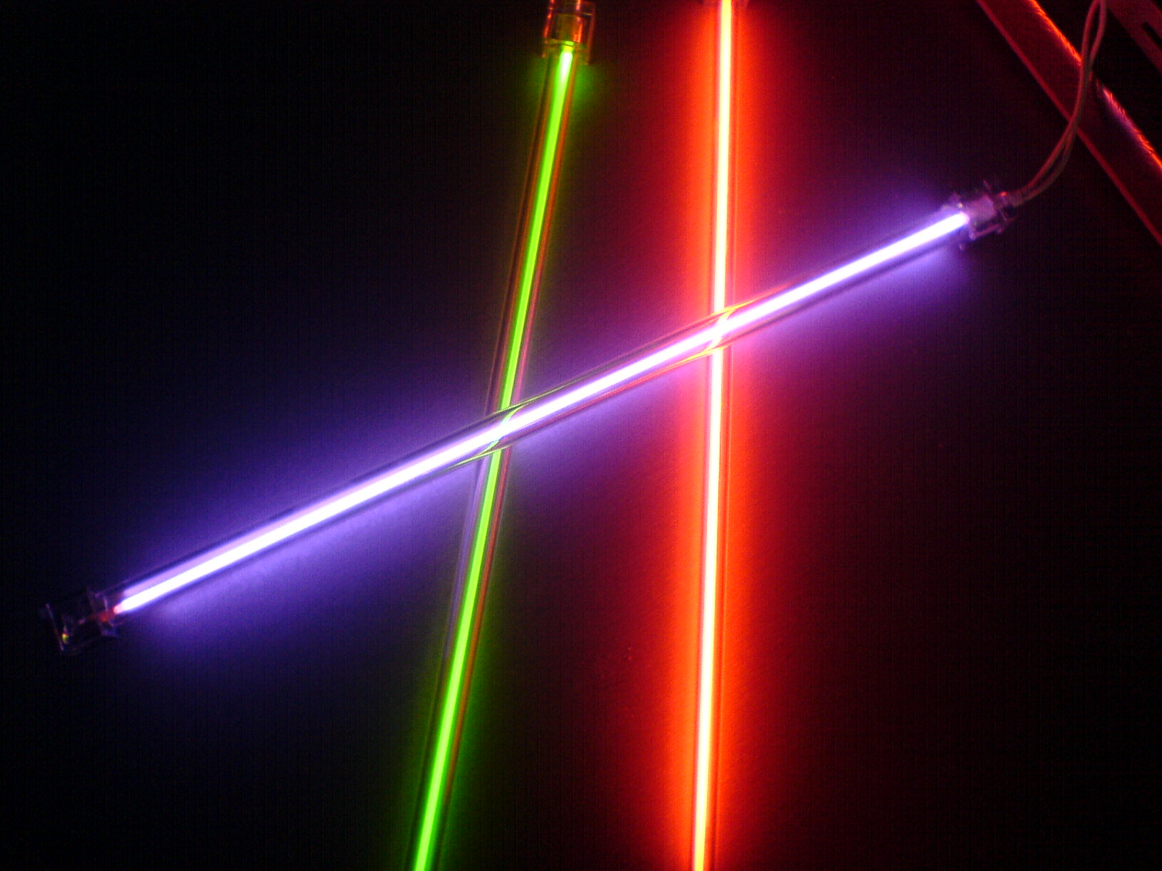 Trois néons